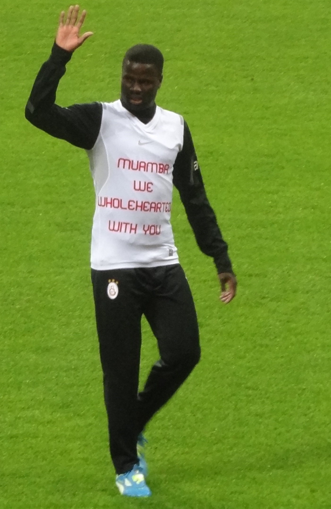 Eboue'nin Sivasspor Kupa maçı öncesi Muamba için giydiği T-Shirt